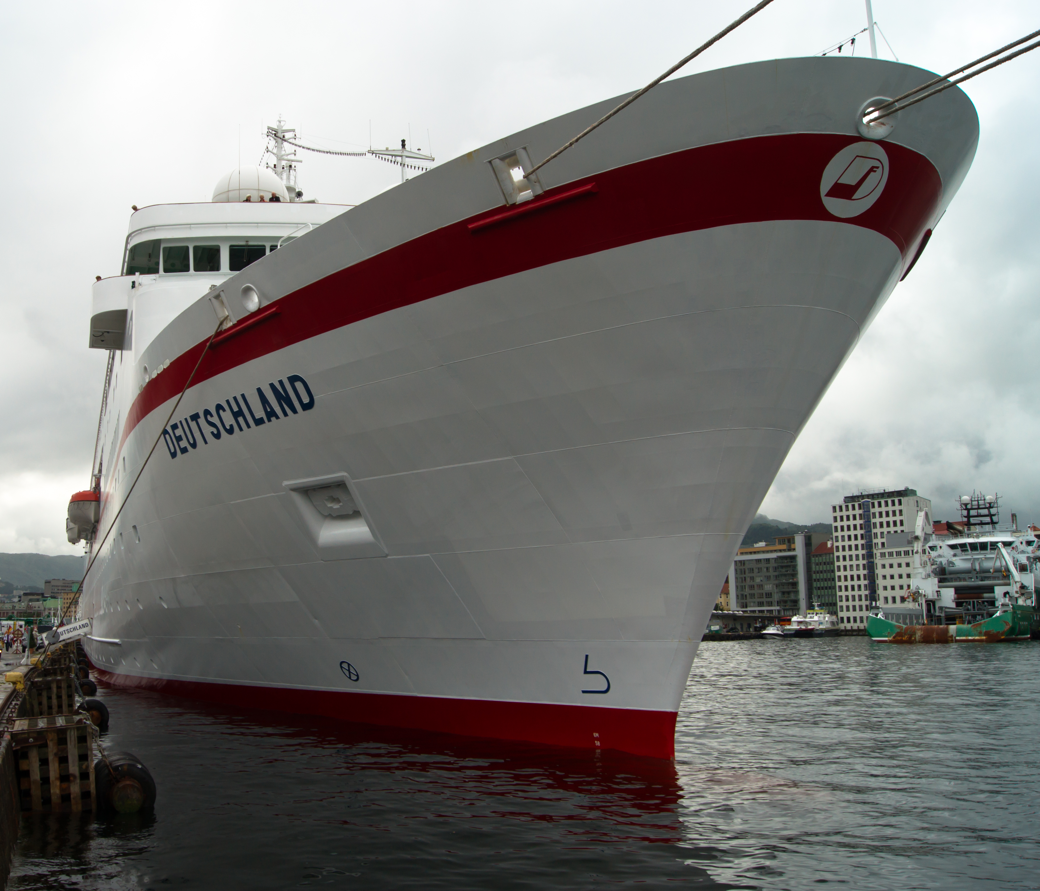 Etrave du MS Deutschland à Bergen.